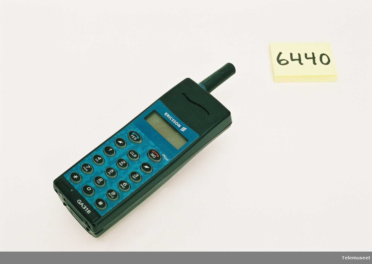 Ericsson GA318 (GSM). Telefonen kom på markedet i 1996, og denne er produsert i uke 44 1996. Telefonen er gitt til Norsk Telemuseum, Oslo av Tor Valen, Skien 23/5 2007.